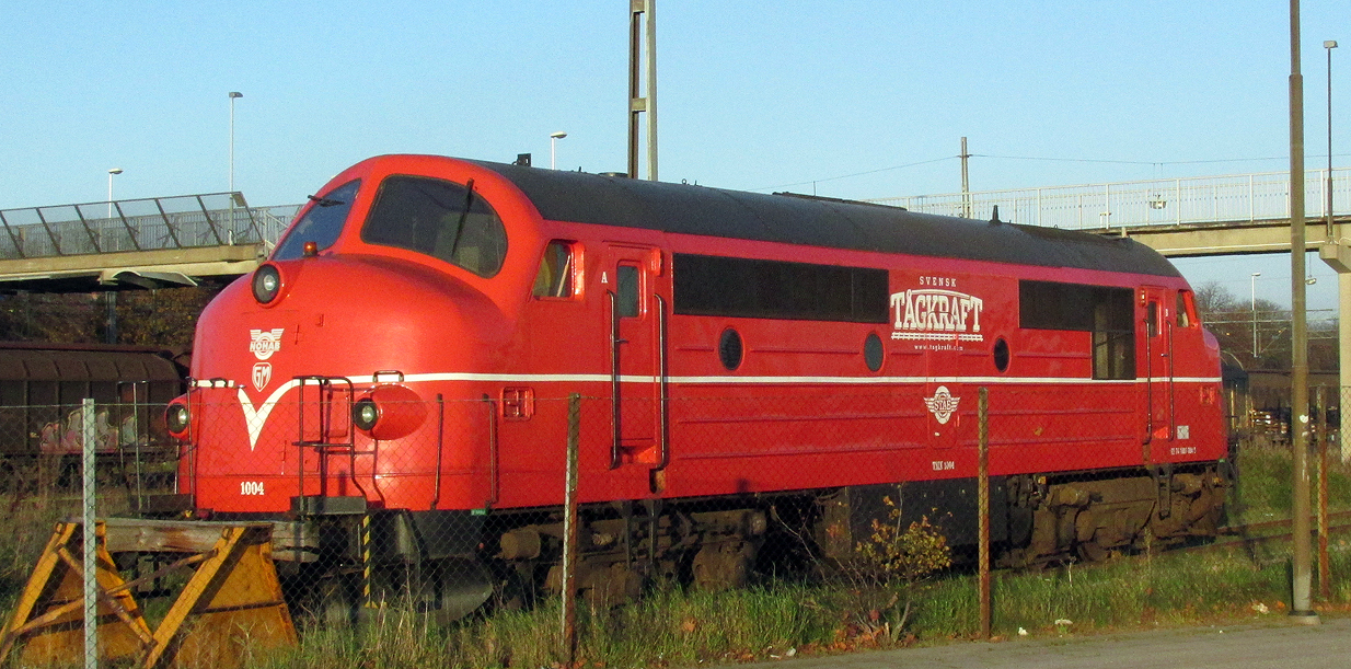 Diesellok på Ystads rangerbangård 2014.